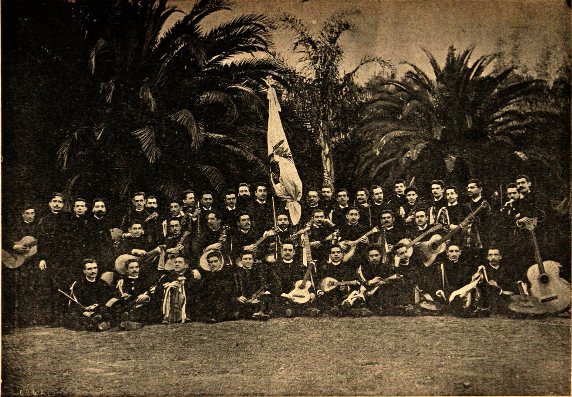 A Tuna Académica de Lisboa - publicado em: Branco e Negro, nº 7, 17 de Maio de 1896